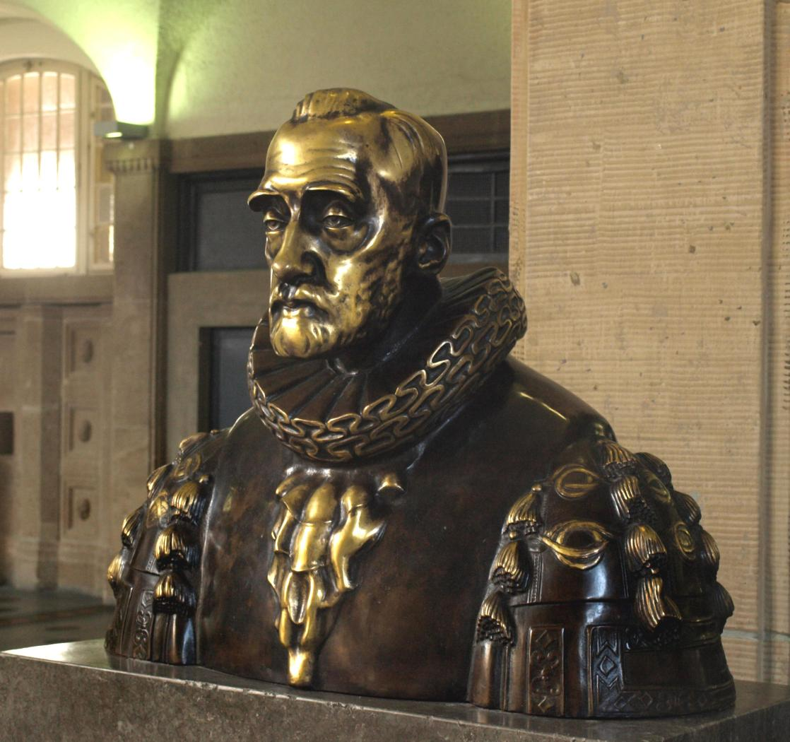 Werner-von-Melle-Büste im Hauptgebäude der Universität Hamburg, Foto 2013